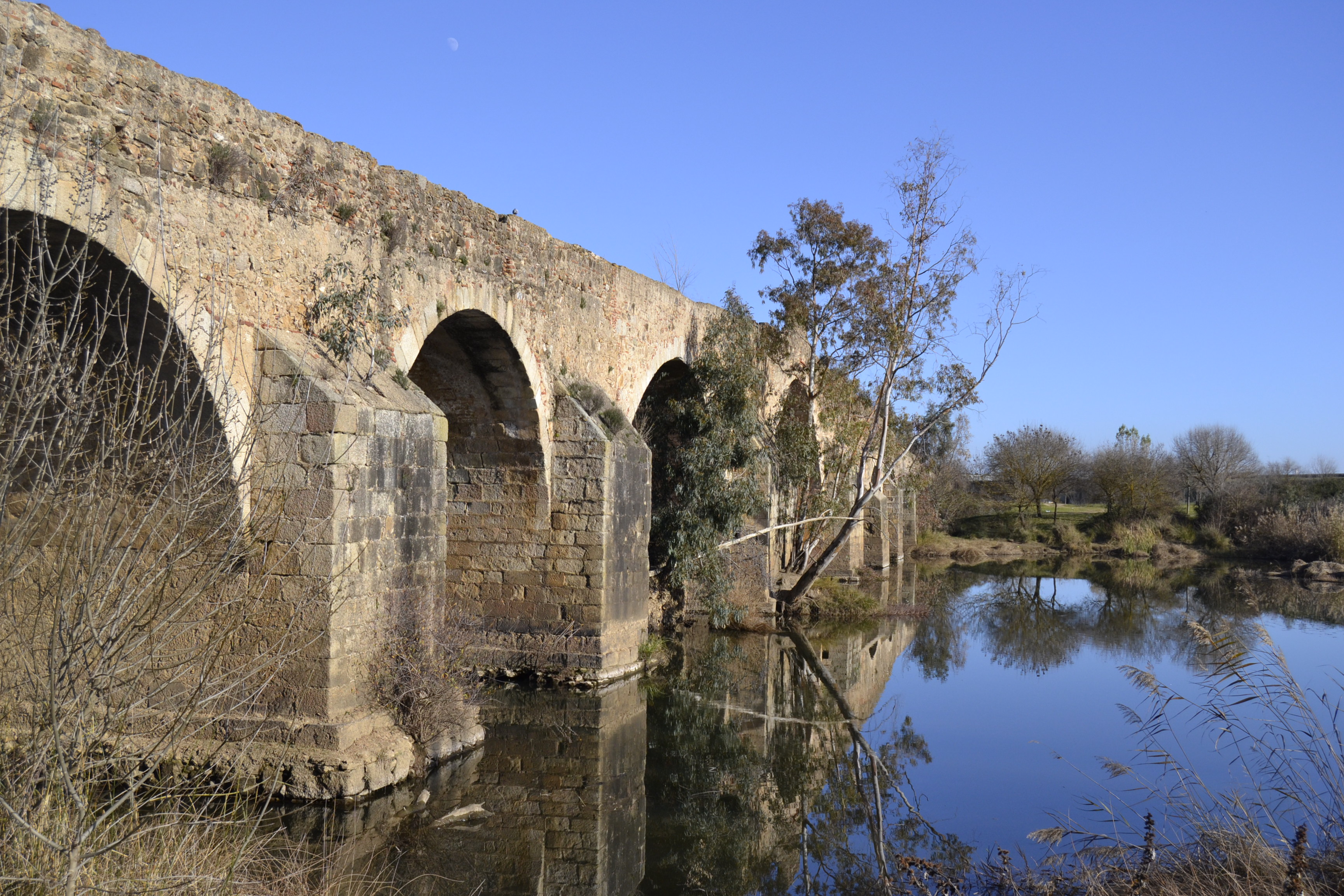 Puente de Cantillana. Perspectiva de su longitud. Enero de 2012